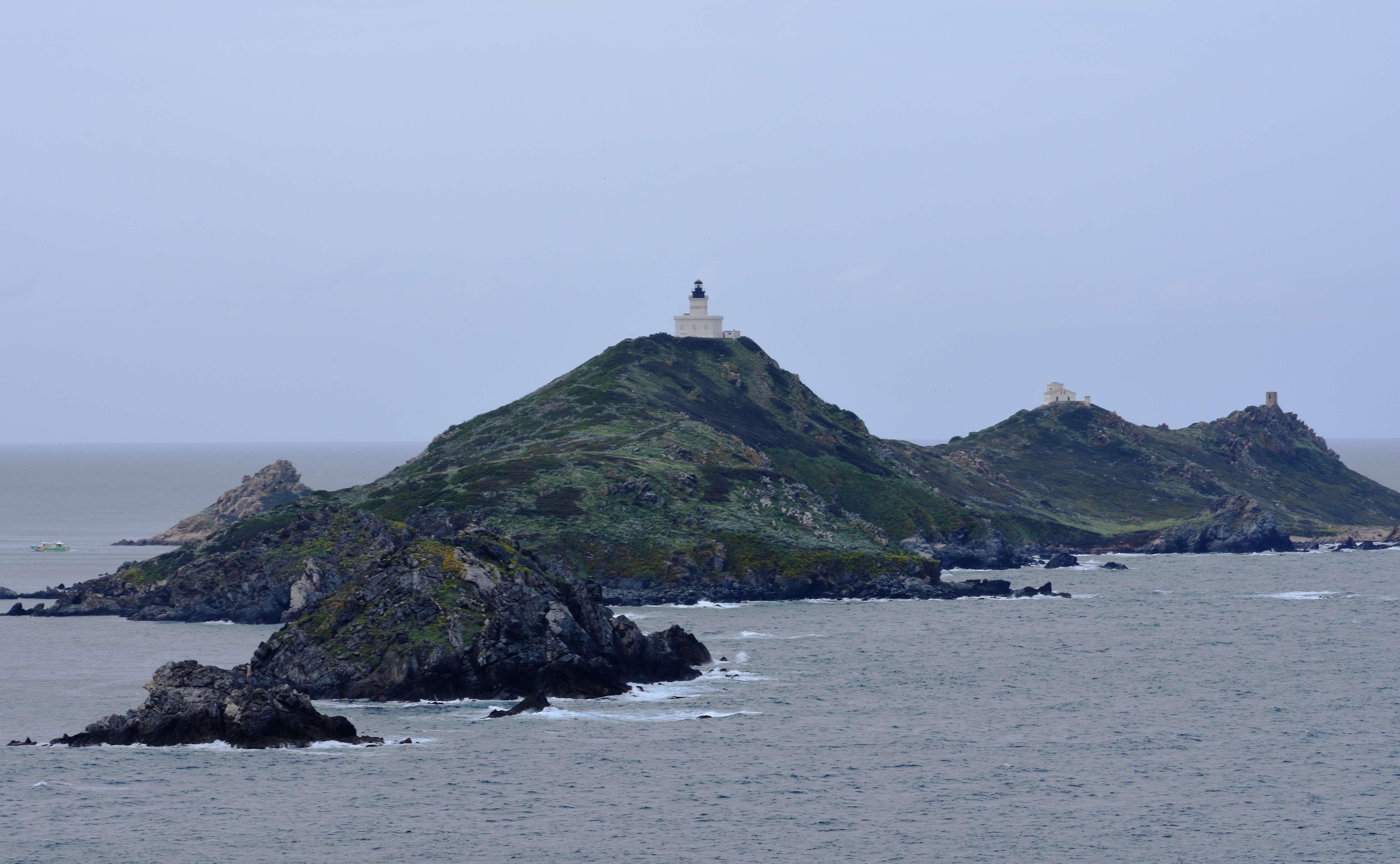 Les Îles sanguinaires vu de la Pointe de la Parata